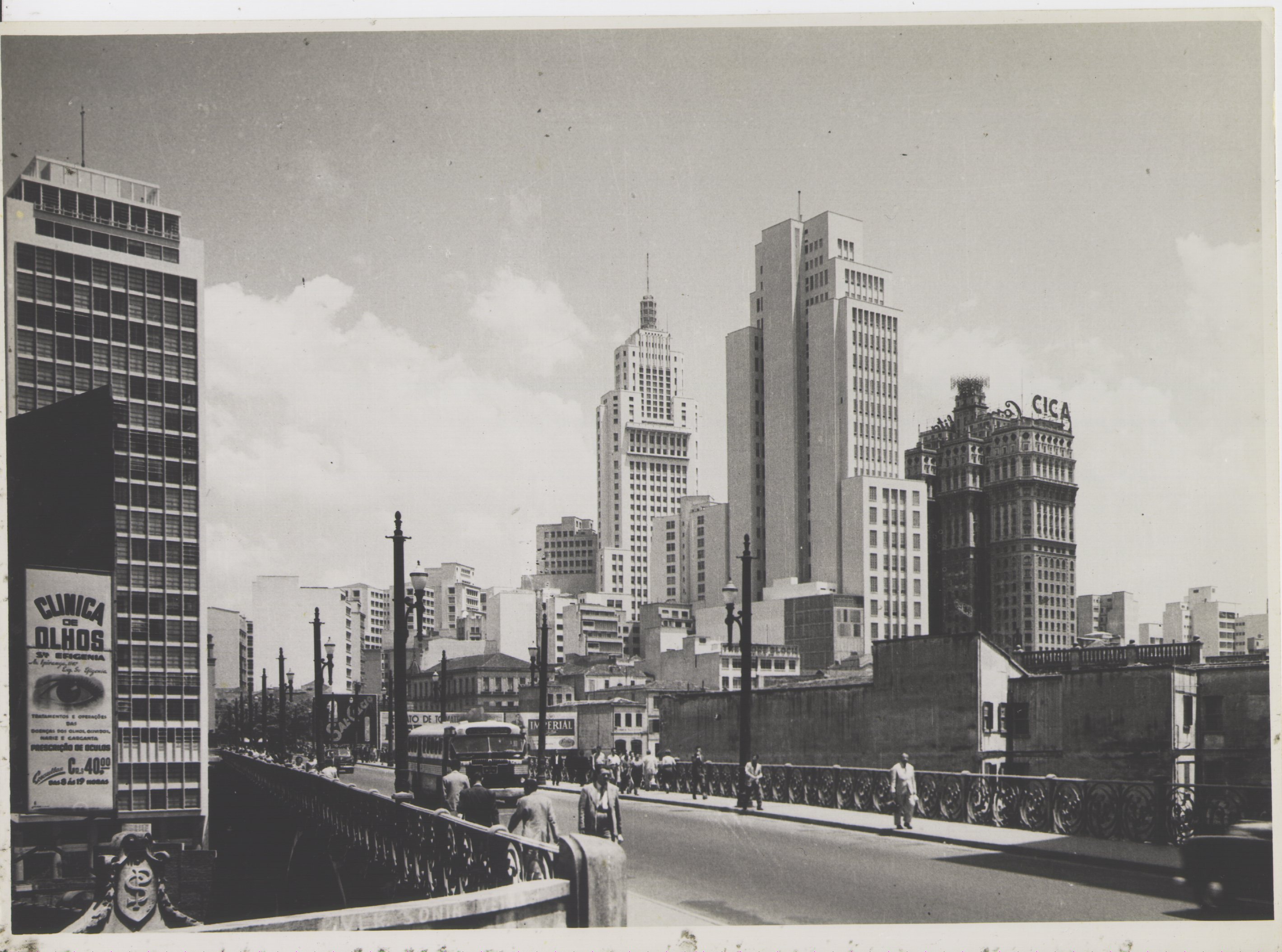 Obra que integra o acervo do Museu Paulista da USP. Coleção Werner Haberkorn